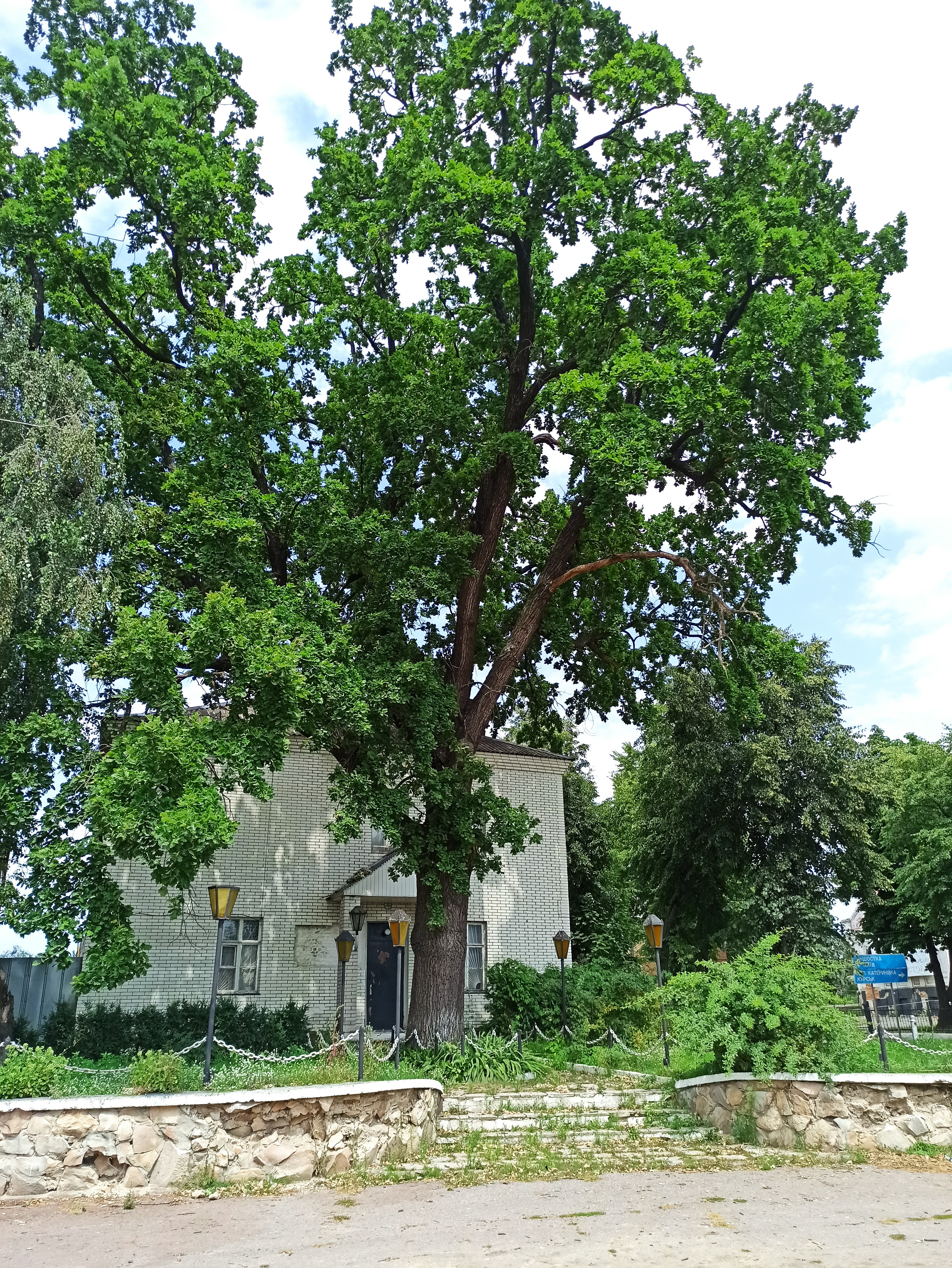 «Гетьманський дуб», м. Глухів, на розі вулиць Терещенків та Благодатної